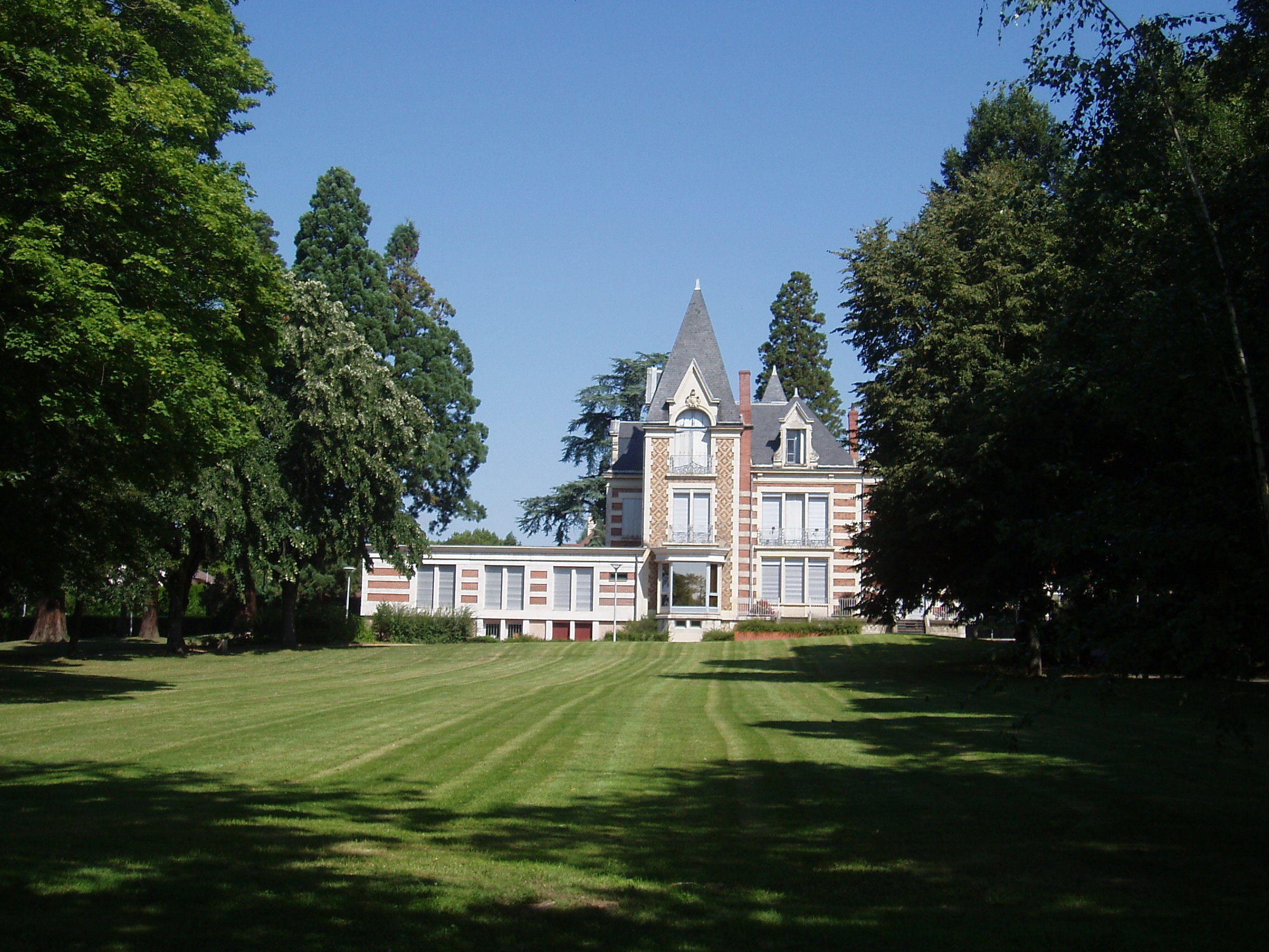 Mairie de St Germain